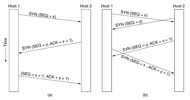 TCP əlaqəsinin qurulması